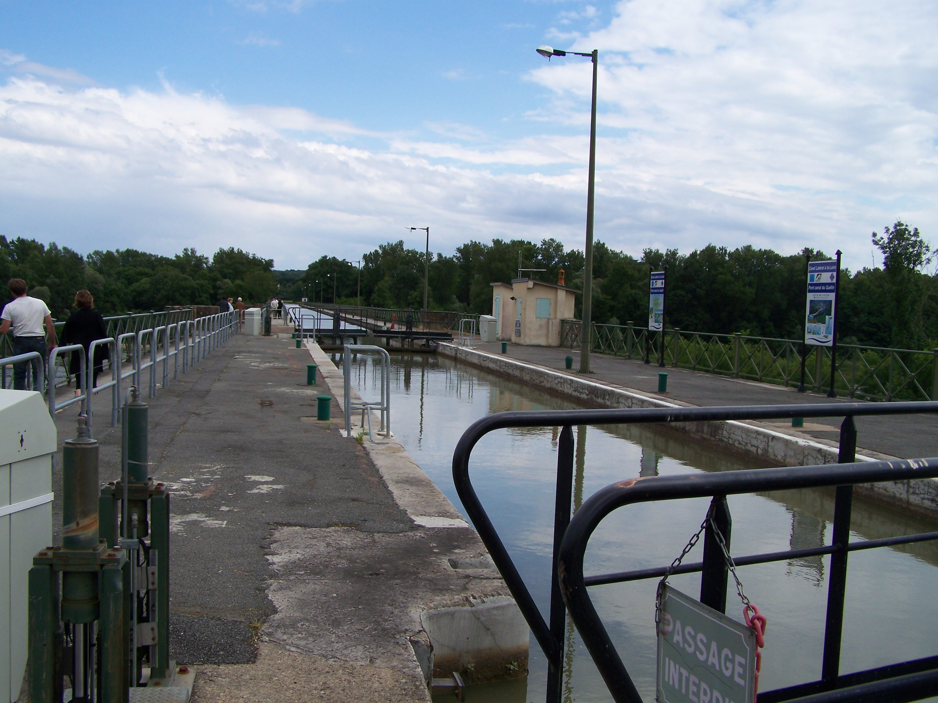 Vue sur le Pont-canal du Guétin, à Cuffy.